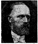 Carl Gustaf Malmström (1822–1912), historiker, professor, riksarkivarie, ledamot av Svenska Akademien.